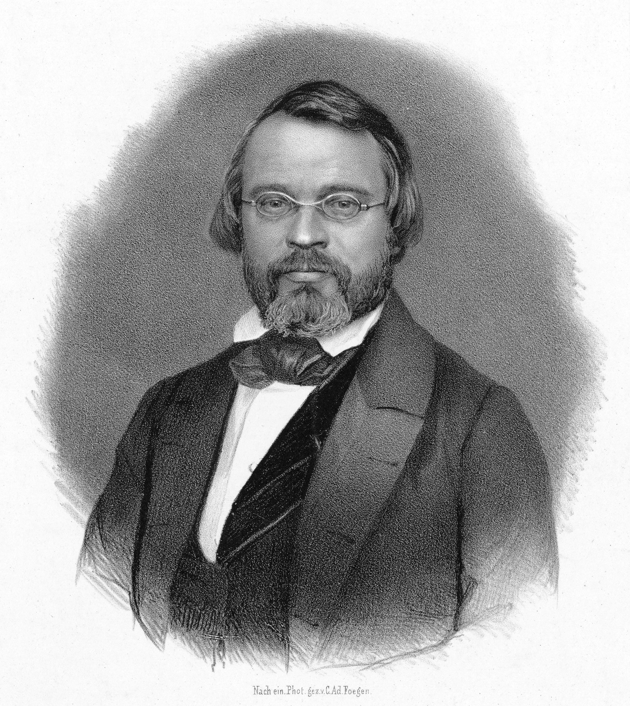 Otto Jahn / nach ein. Phot. gez. v. C. Ad. Foegen